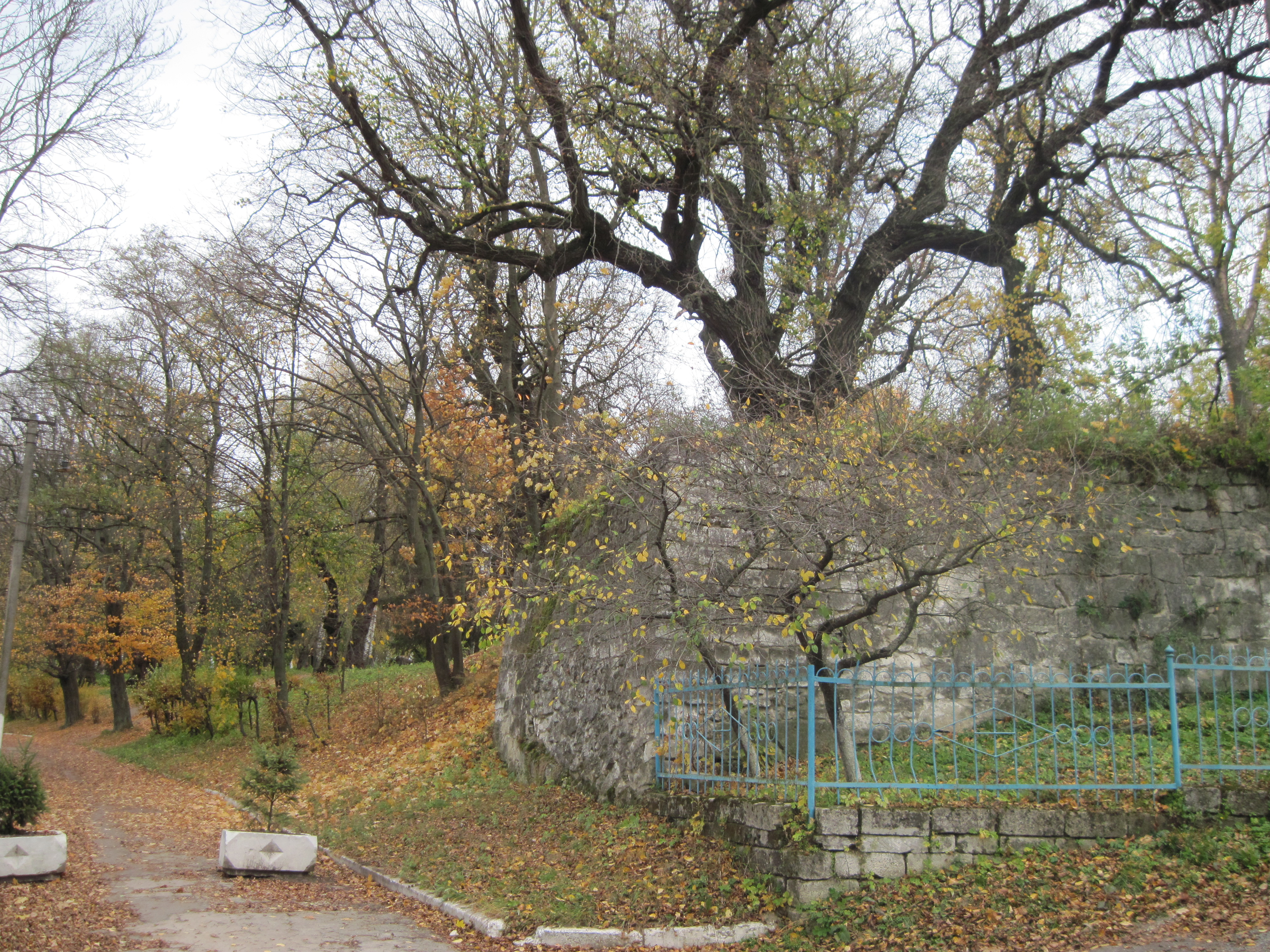 Збаразький замок